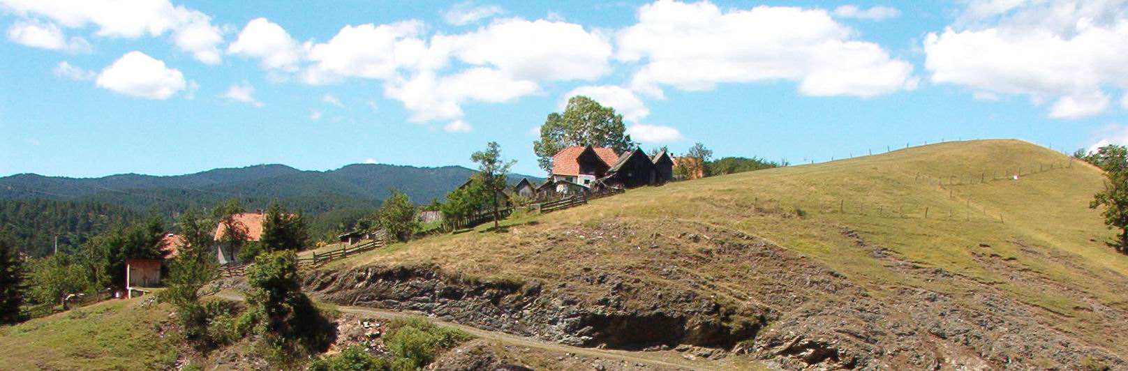 Тарабићи 2005.